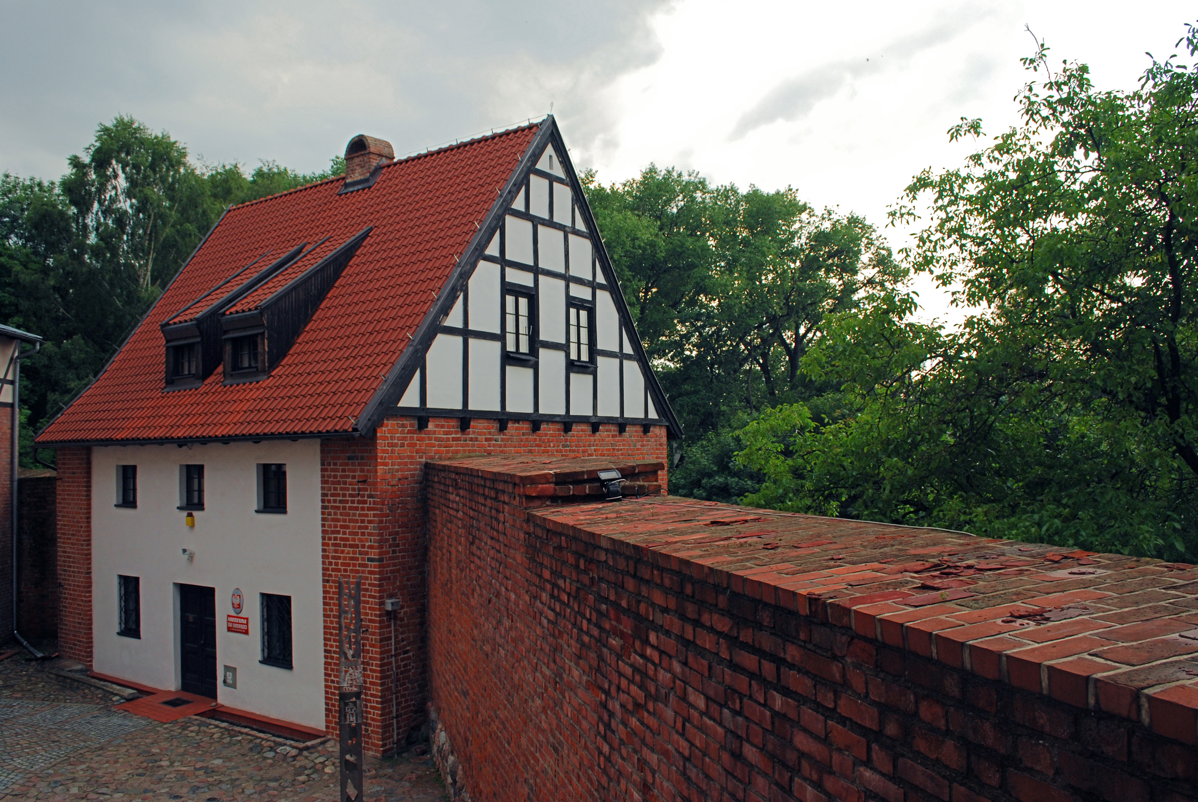 Starogard Gdański, ul. Boczna 2 - budynek "Muzeum Ziemi Kociewskiej" w zespole murów obronnych (zabytek nr 1019)